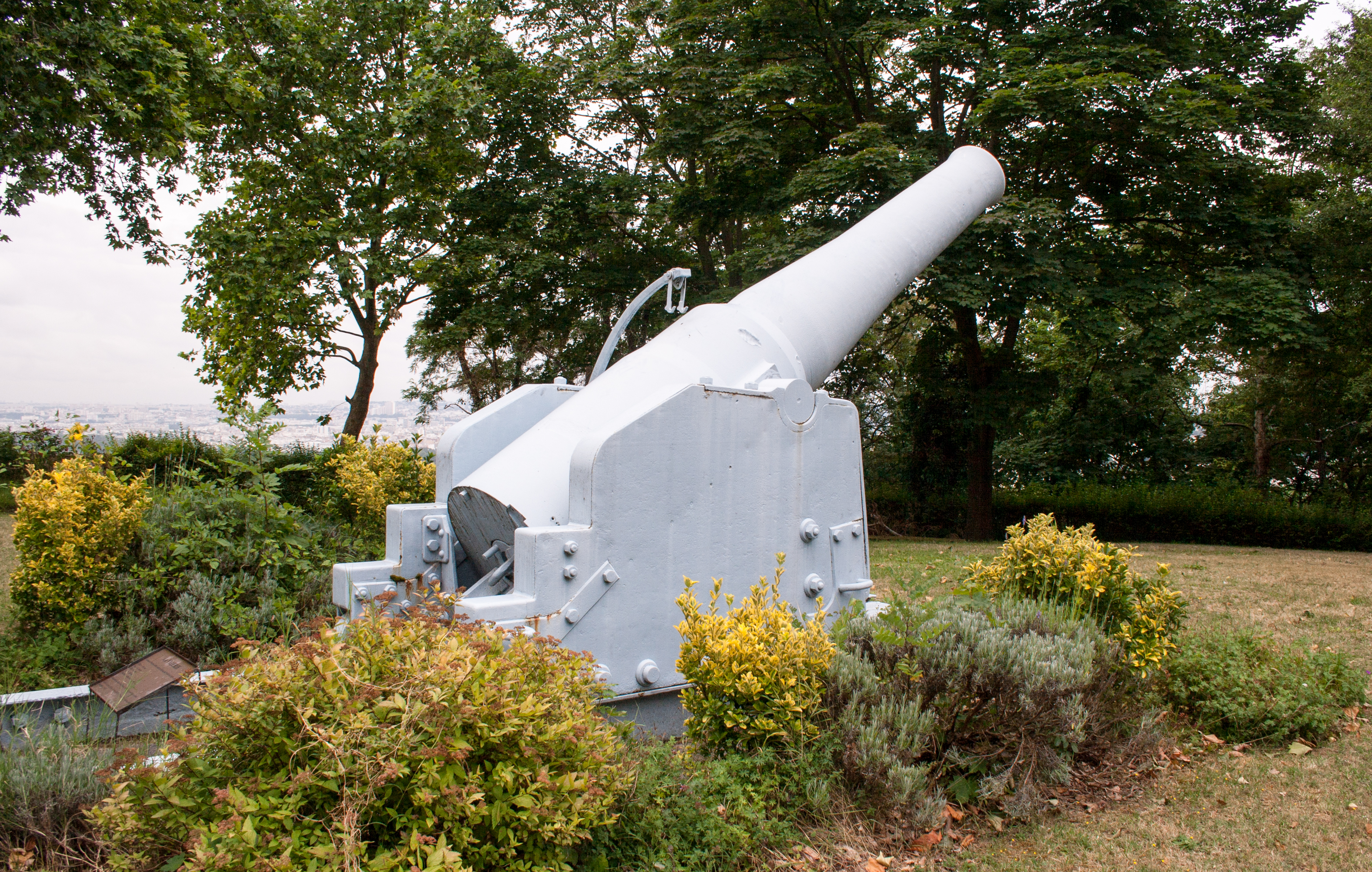 Cannon La Valérie in the Fortress of Mont Valérienlabel QS:Len,"Cannon La Valérie in the Fortress of Mont Valérien" label QS:Lhu,"A La Valérie ágyú a Mont Valérien erődben"